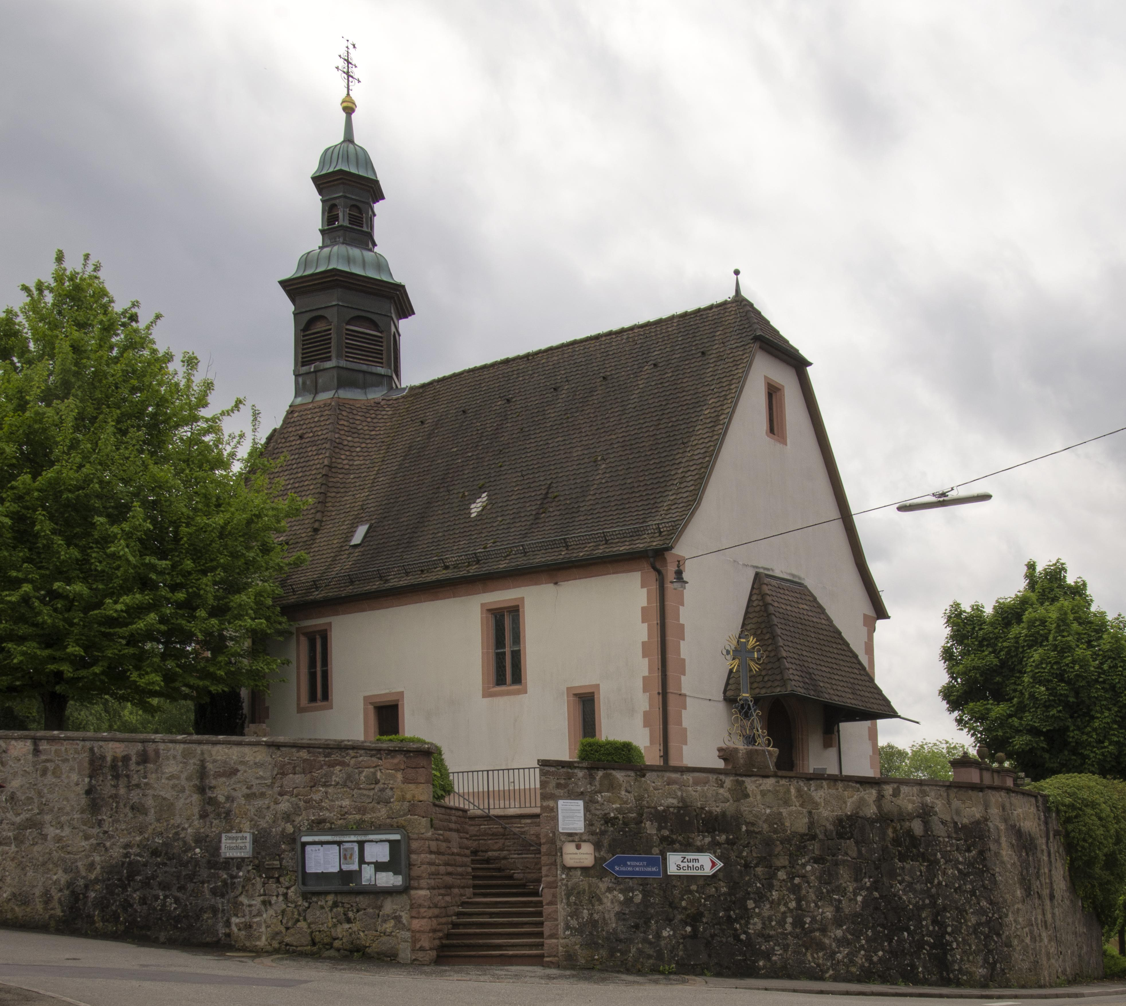 Bilder von der Bühlwegkapelle in Ortenberg